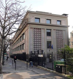 Sede della Camera di Commercio Internazionale a Parigi.